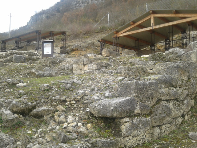 Templi di Lucus Angitiae